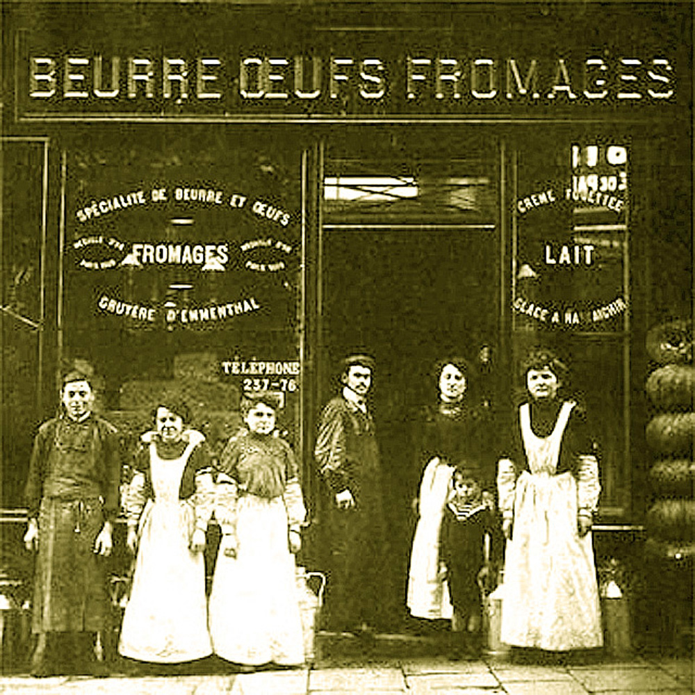 Famille Androuët devant leur crèmerie